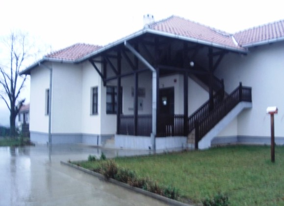 Школа у Гвозденовићу.